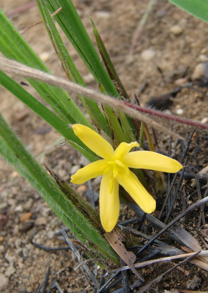 Curculigo scorzonerifolia (Lam.) Baker - ( bas. Hypoxis scorzonerifolia Lam.; sin. hom. Curculigo scorzonaerifolia (Lam.) Baker; Heliacme scorzonerifolia (Lam.) Ravenna ) - HYPOXIDACEAE - Chapada Imperial - Brazlândia - Distrito Federal - Brasil.